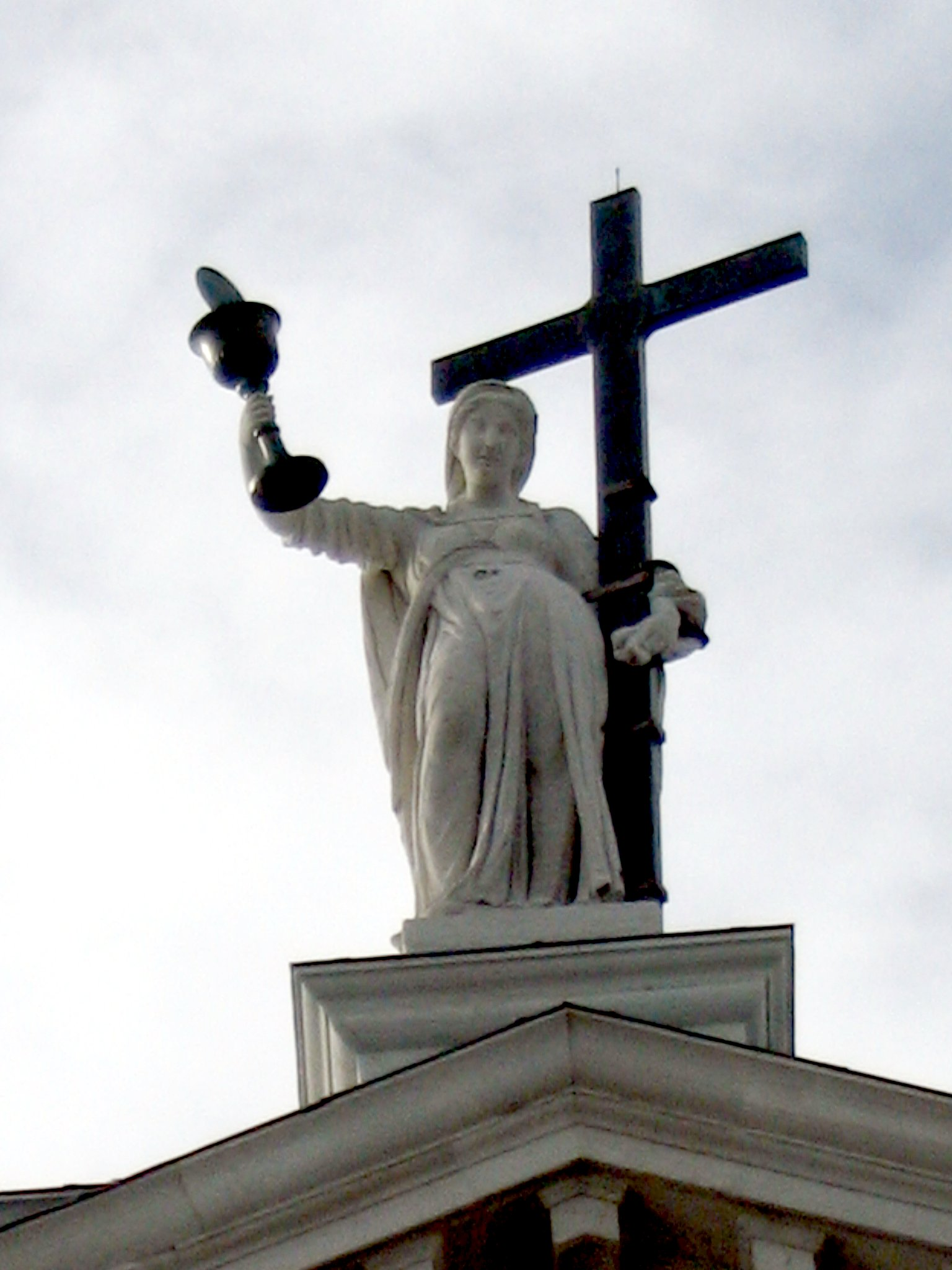 Statua allegorica della Fede. Venezia, chiesa del Redentore.